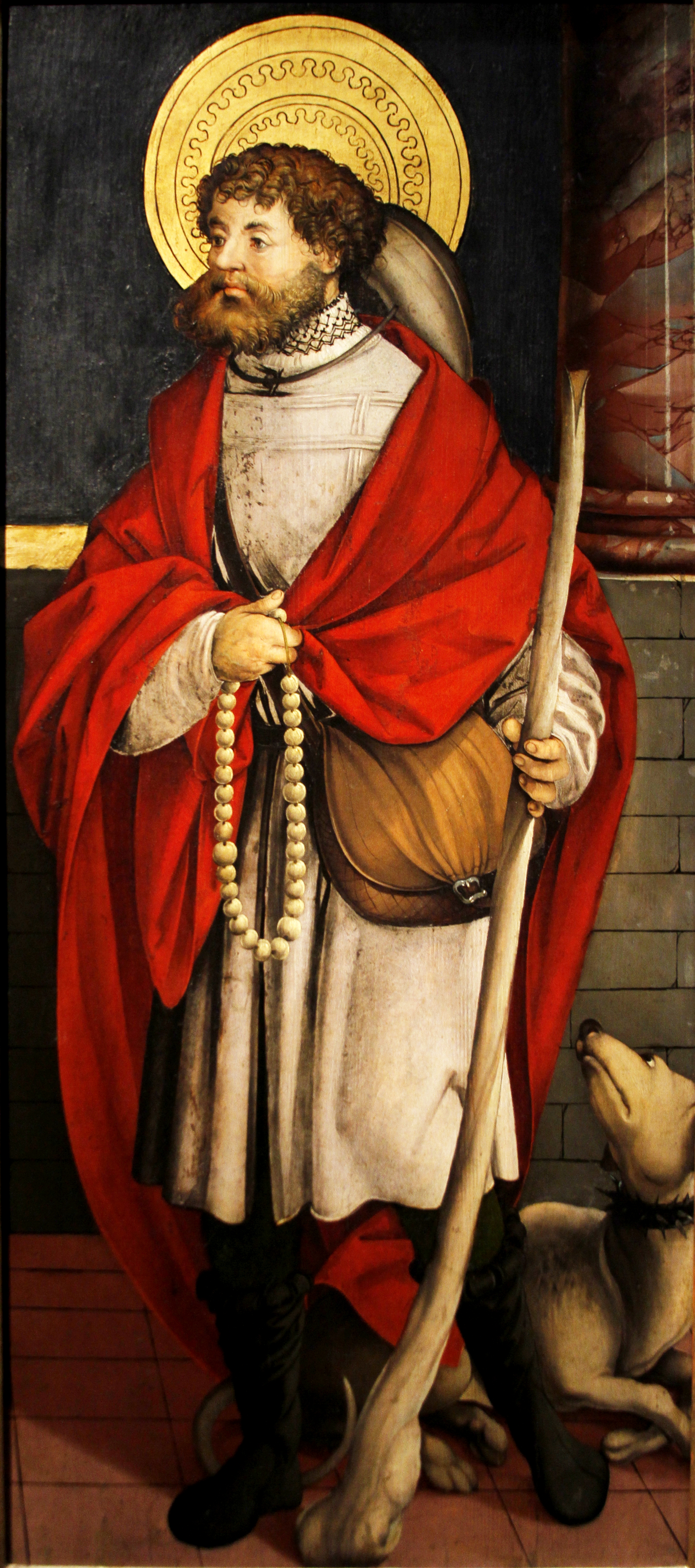 Staatsgalerie - Stuttgart - Germany